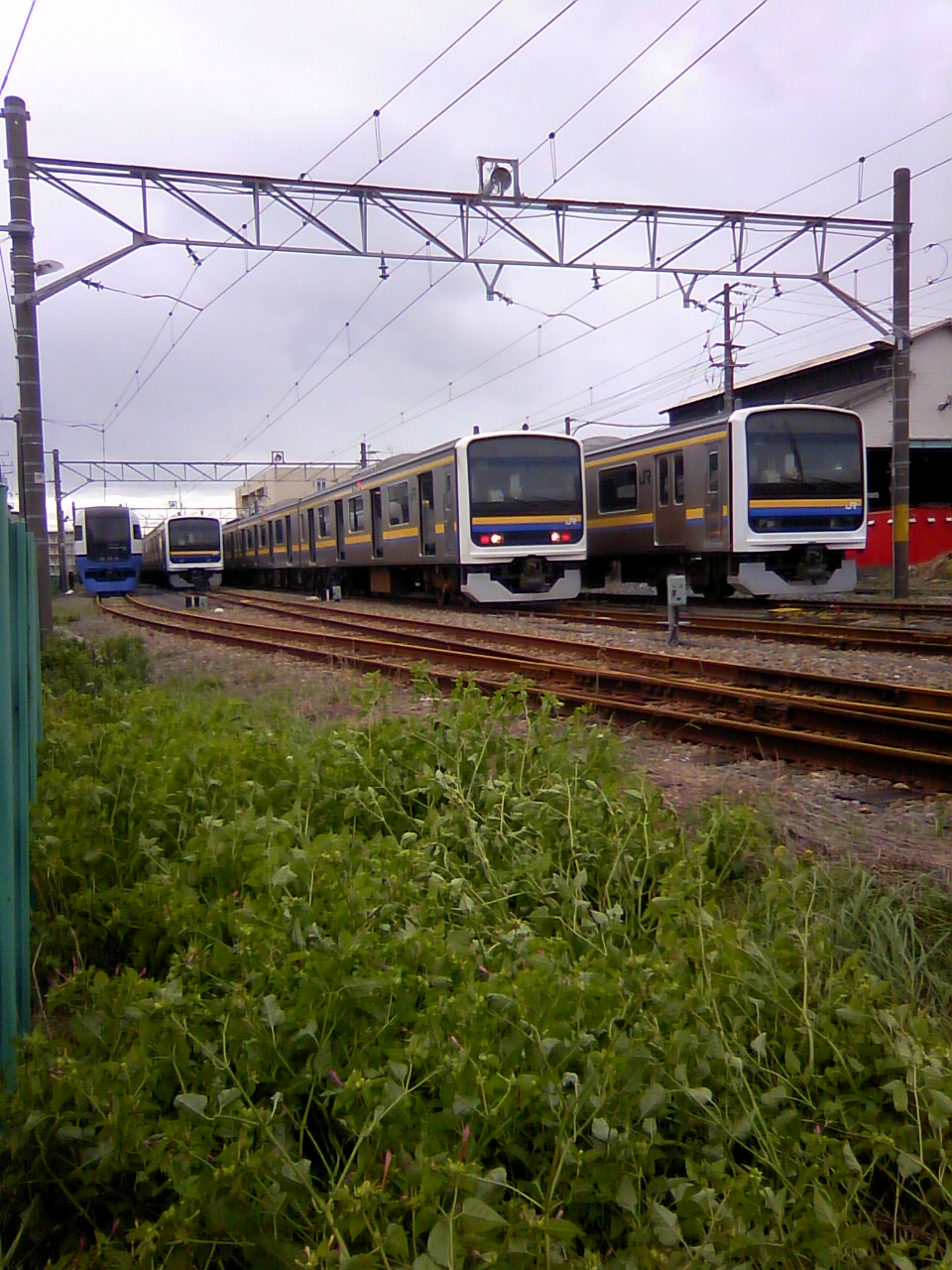 電留線に待機中の内房線の列車 ※この日は台風の影響で内房線が始発から全線でストップした。